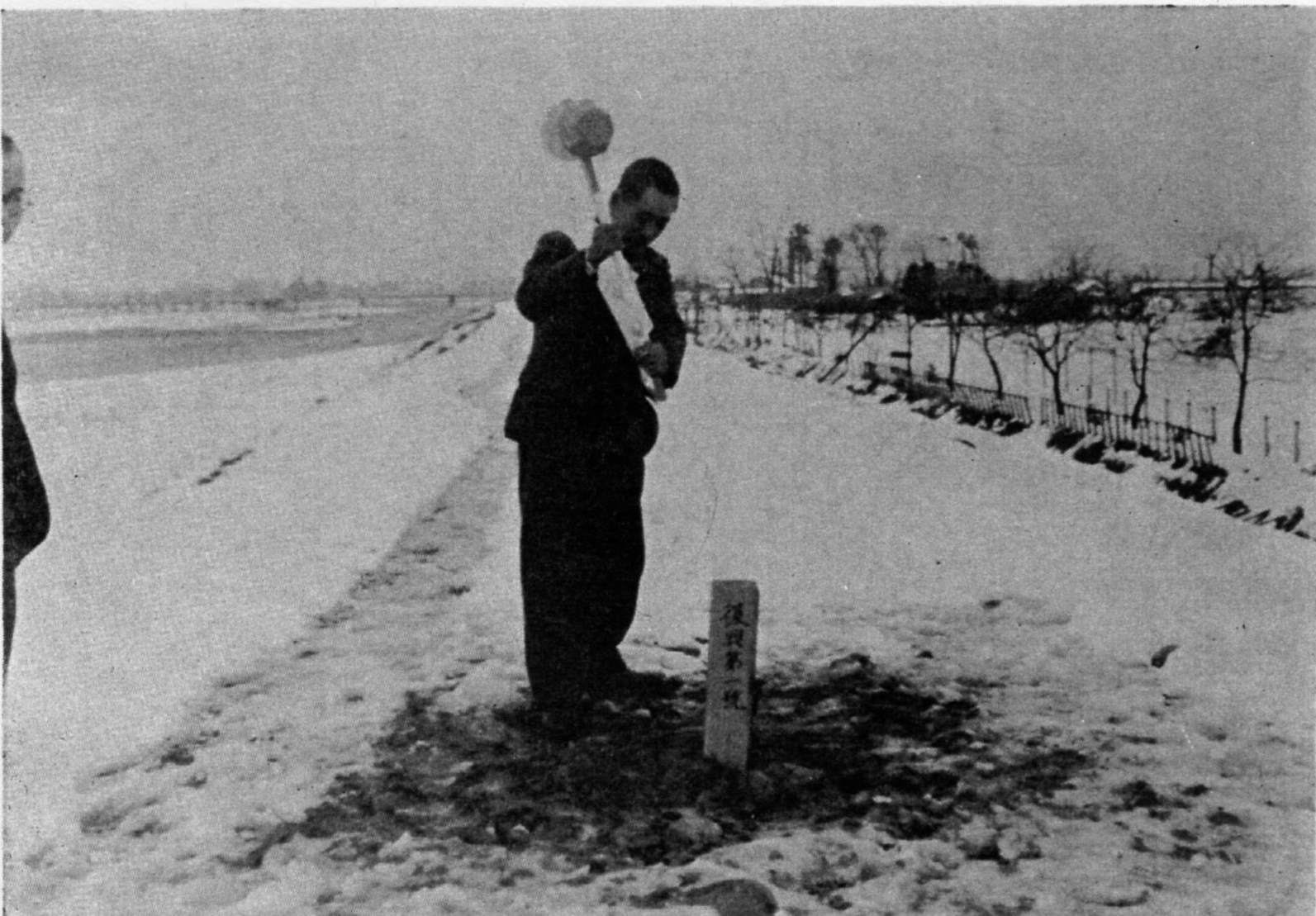 富山県知事の復興事業起工式における杭打ち